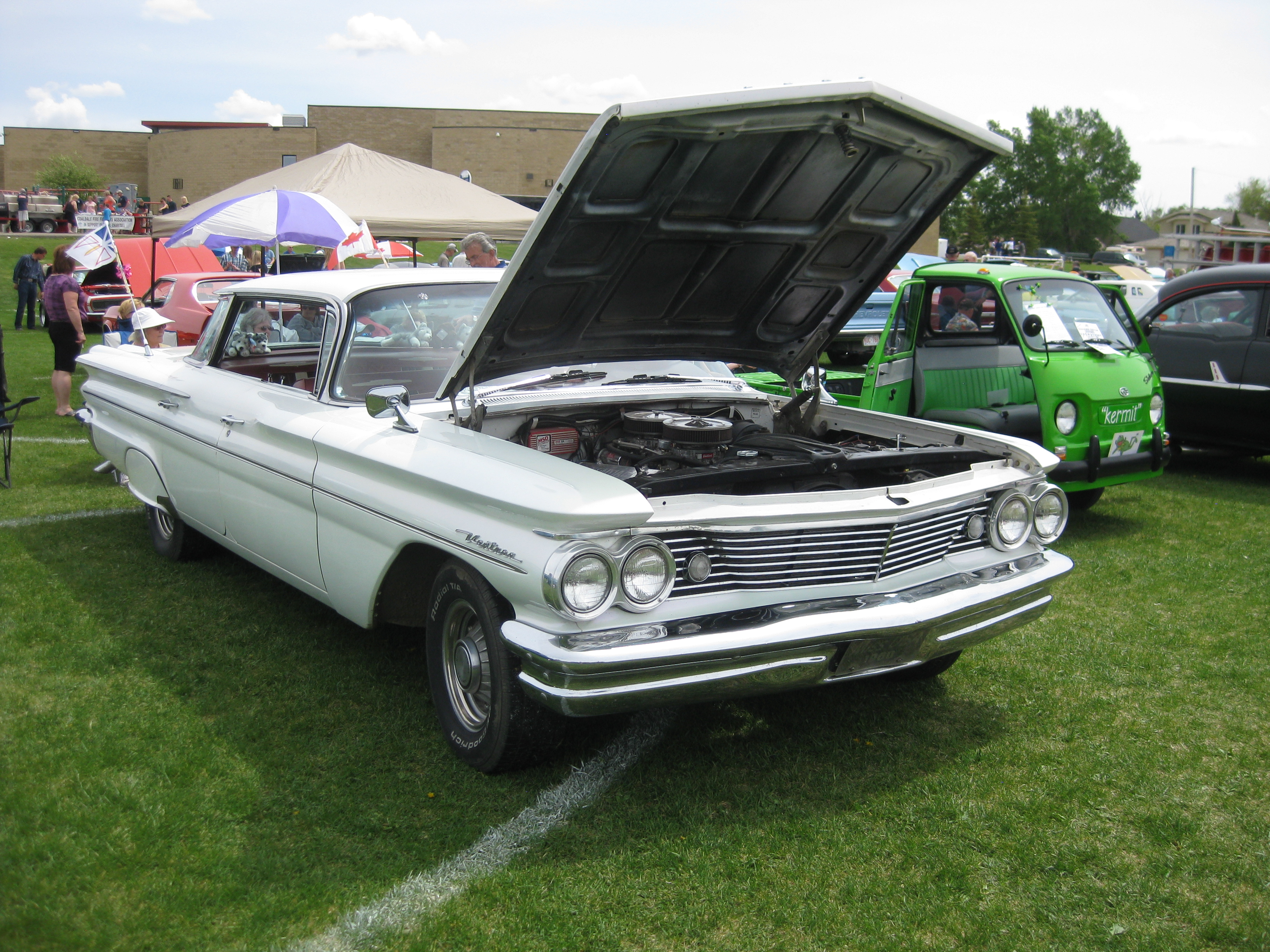 1960 Pontiac Ventura Vista